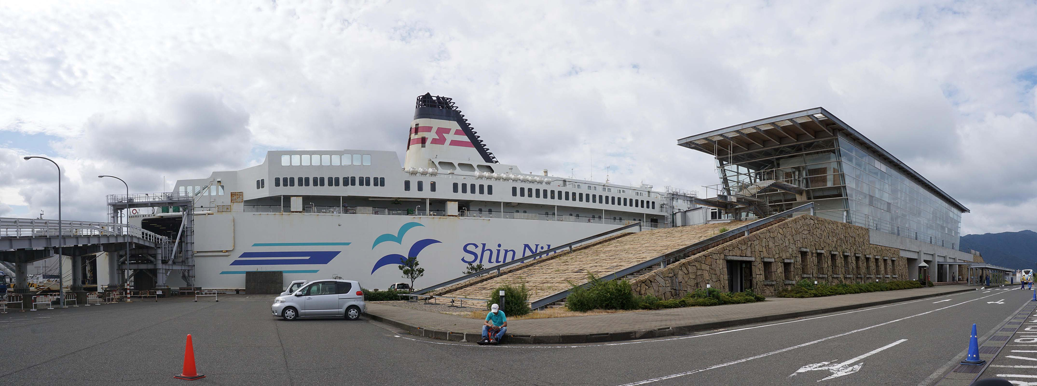 Tsuruga Ferry Terminal , 新日本海フェリー 敦賀フェリーターミナル